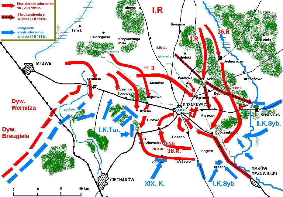 Mapka ukazująca natarcie niemieckie na Przasnysz w dniach 18 II do 24 II 1915 roko w czasie Bitwy przasnyskiej